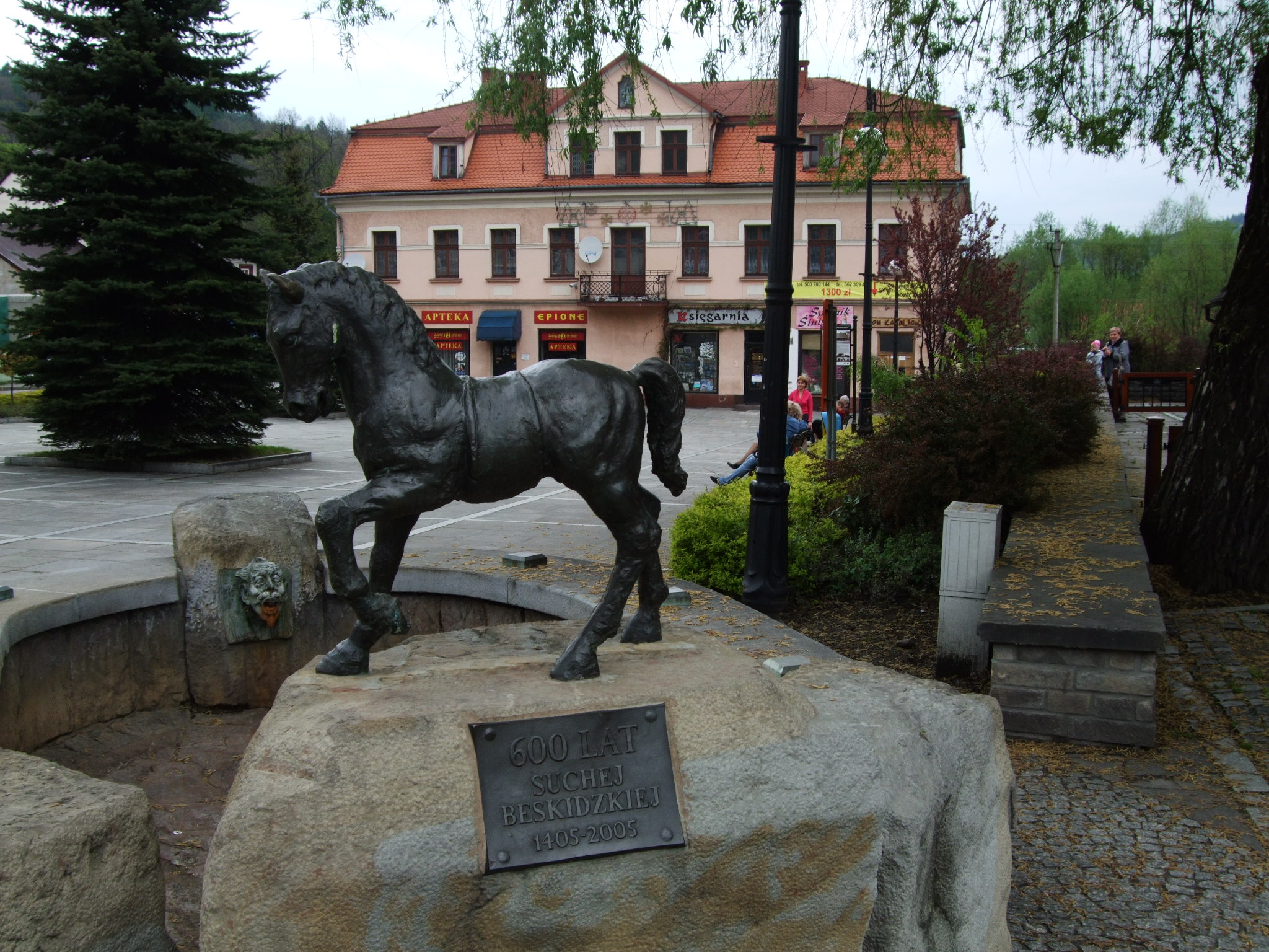 Fontanna w Rynku Suchej B. przedstawiająca herb miasta (projekt W.Kwak) i głowy Twardowskiego i Mefistofelesa. W głębi widoczny Dom Katolicki ufundowany przez Annę Tarnowską.